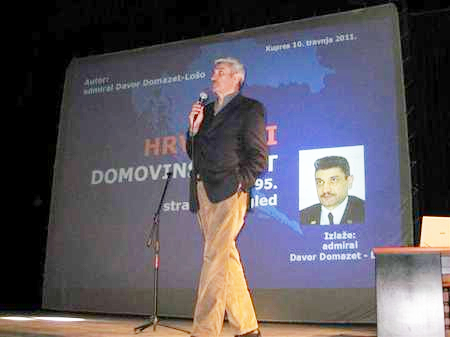 Davor Domazet Lošo,na predstavljanju knjige u Kupresu